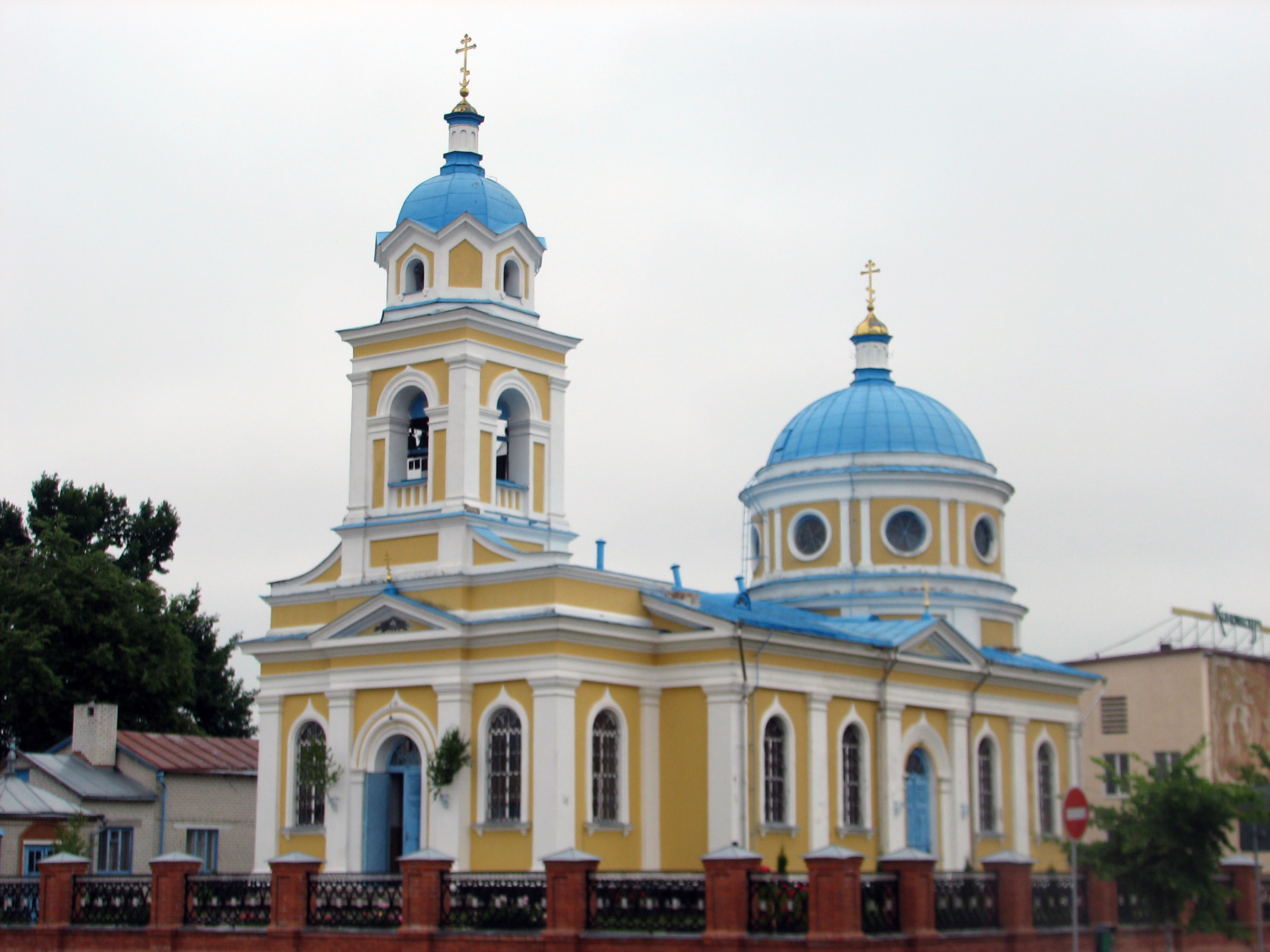 Беларуская (тарашкевіца): Сабор Аляксандра Неўскага (Пружаны)